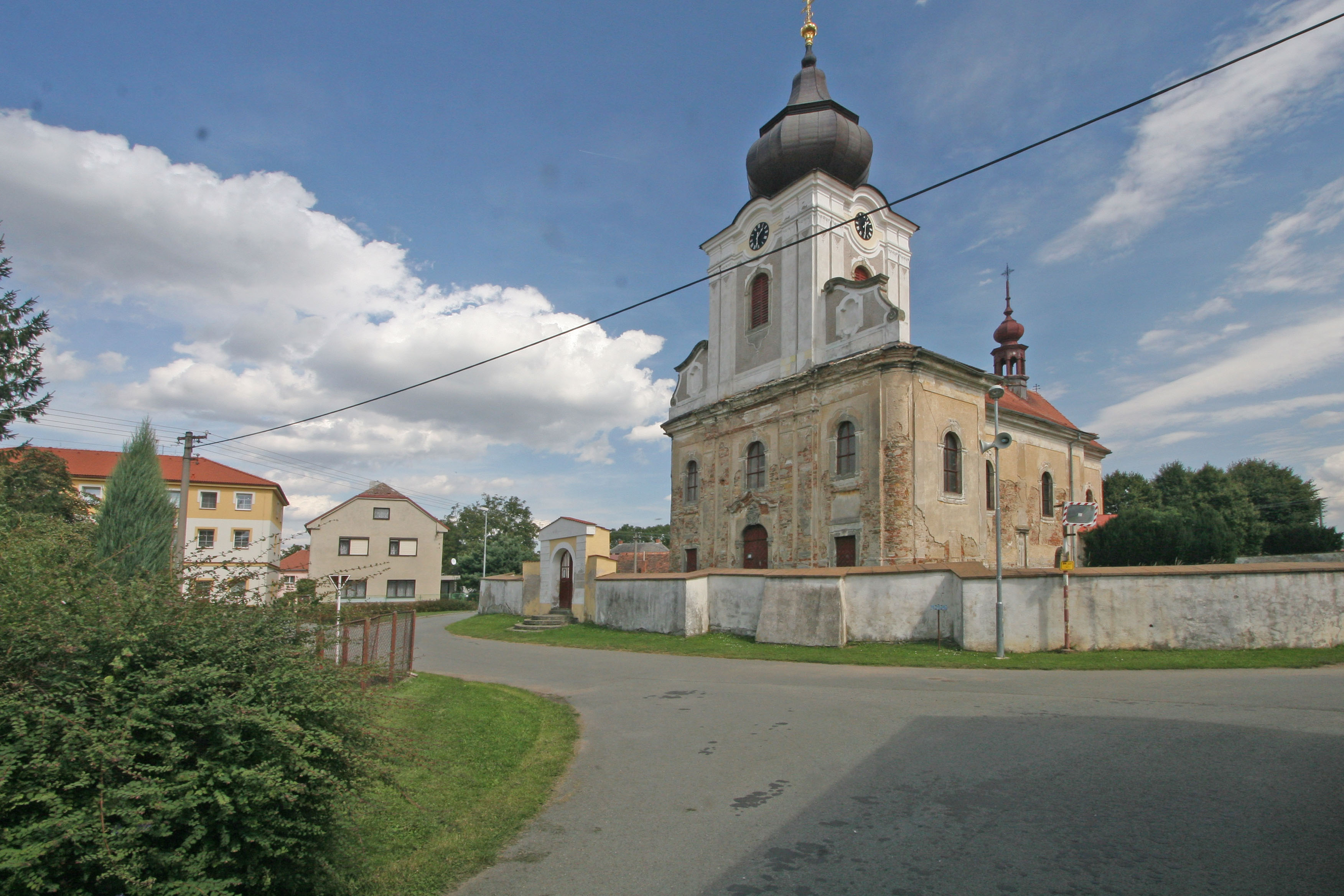 Kostel svatého Vavřince, náves, Svinčany.